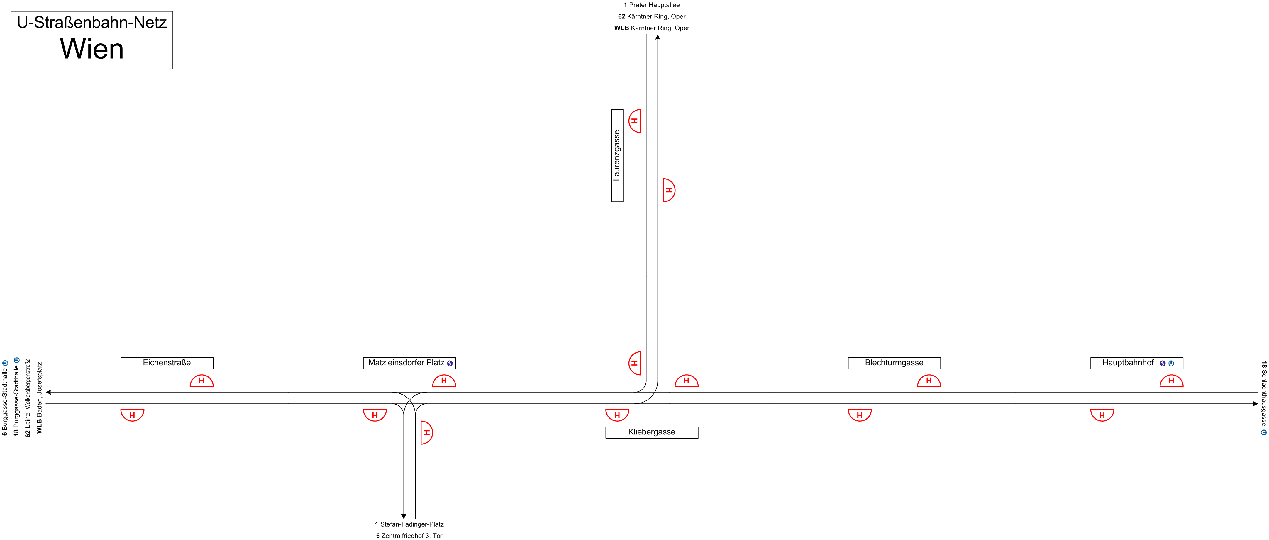 U-Straßenbahn-Netz Wien